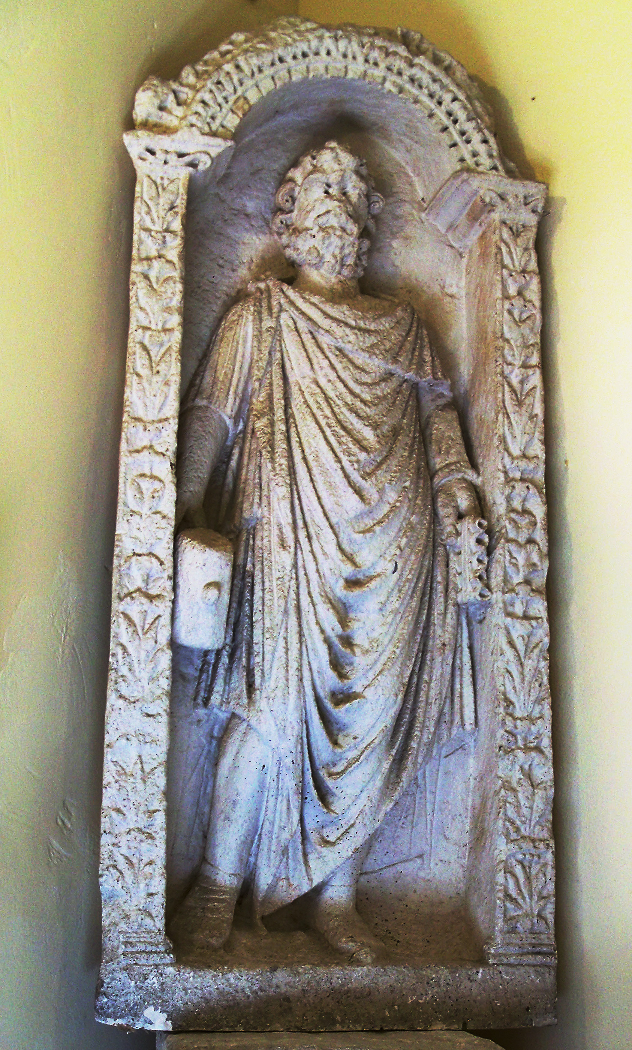 Pierre romaine dans la chapelle Sainte-Thècle à Séguret (Vaucluse, France) portant l'inscription Marti v(otum) s(oluit) l(ibens) m(erito) / Sex(tus) Eruci[us] / Maxu[m]u[s], « À Mars, Sextus Erucius Maximus s'est acquitté de son vœu volontiers et à juste raison. », CIL XII, 1298 = AE 1960, 0169.